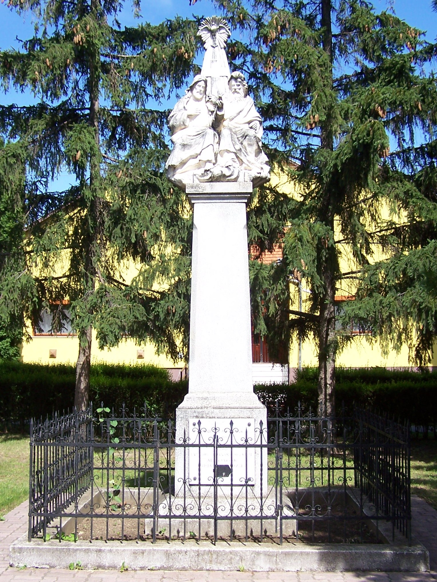 Szentháromság-szobor. késő barokk, 1800 körül. (Kartal, Felszabadulás u. 49. (ház előtt)) This is a photo of a monument in Hungary, Identifier: 7085